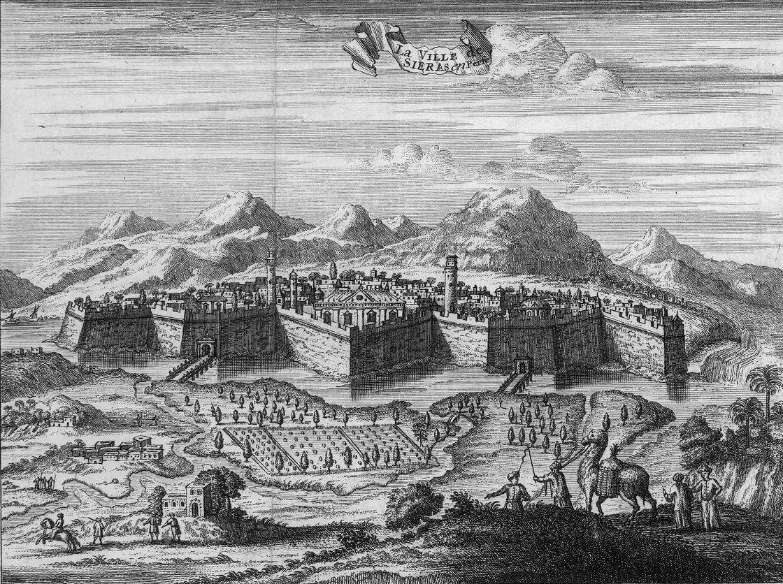 Illustration de Les voyages de Jean Struys, en Moscovie, en Tartarie, en Perse, aux Indes… [réduits en ordre par l’auteur de la préf. an.] avec quantité de figures en taille douce dessinées par lui-même ; et deux l’ettres [sic] qui traitent à fond des malheurs d’Astrac (Amsterdam: Chés la Veuve de Jacob van Meurs 1681)